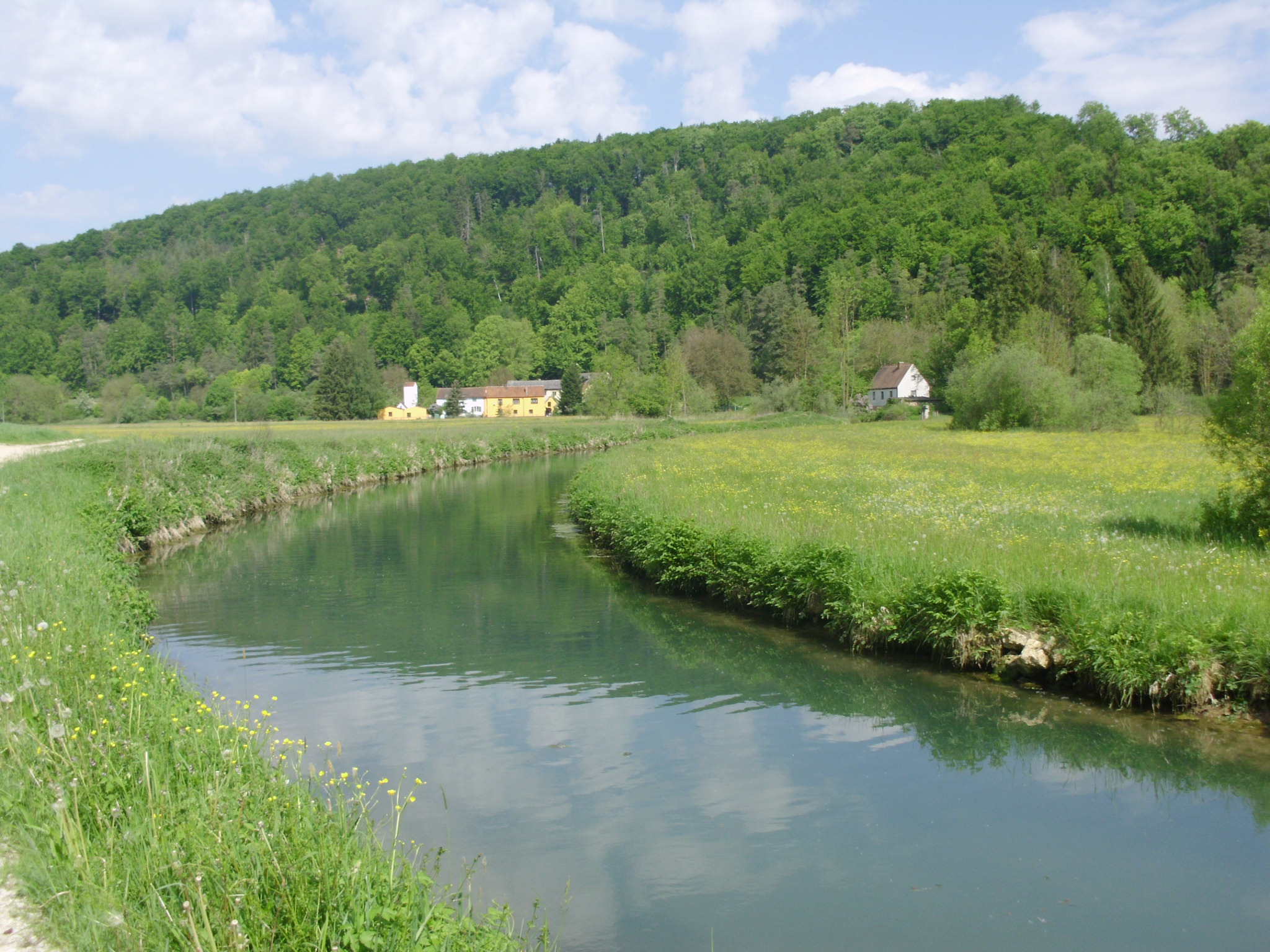 Fuchsmühle am Möhrenbach, Ortsteil von Treuchtlingen im mittelfränkischen Landkreis Weißenburg-Gunzenhausen